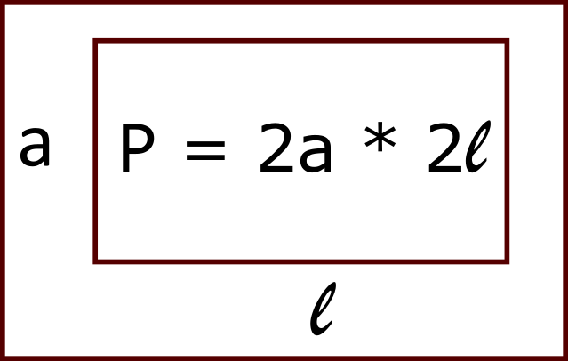 taisnstūra perimetrs